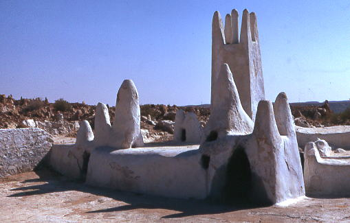 Ghardaïa, Algérie : Mélika, mausolée de Cheikh Sidi Aissa